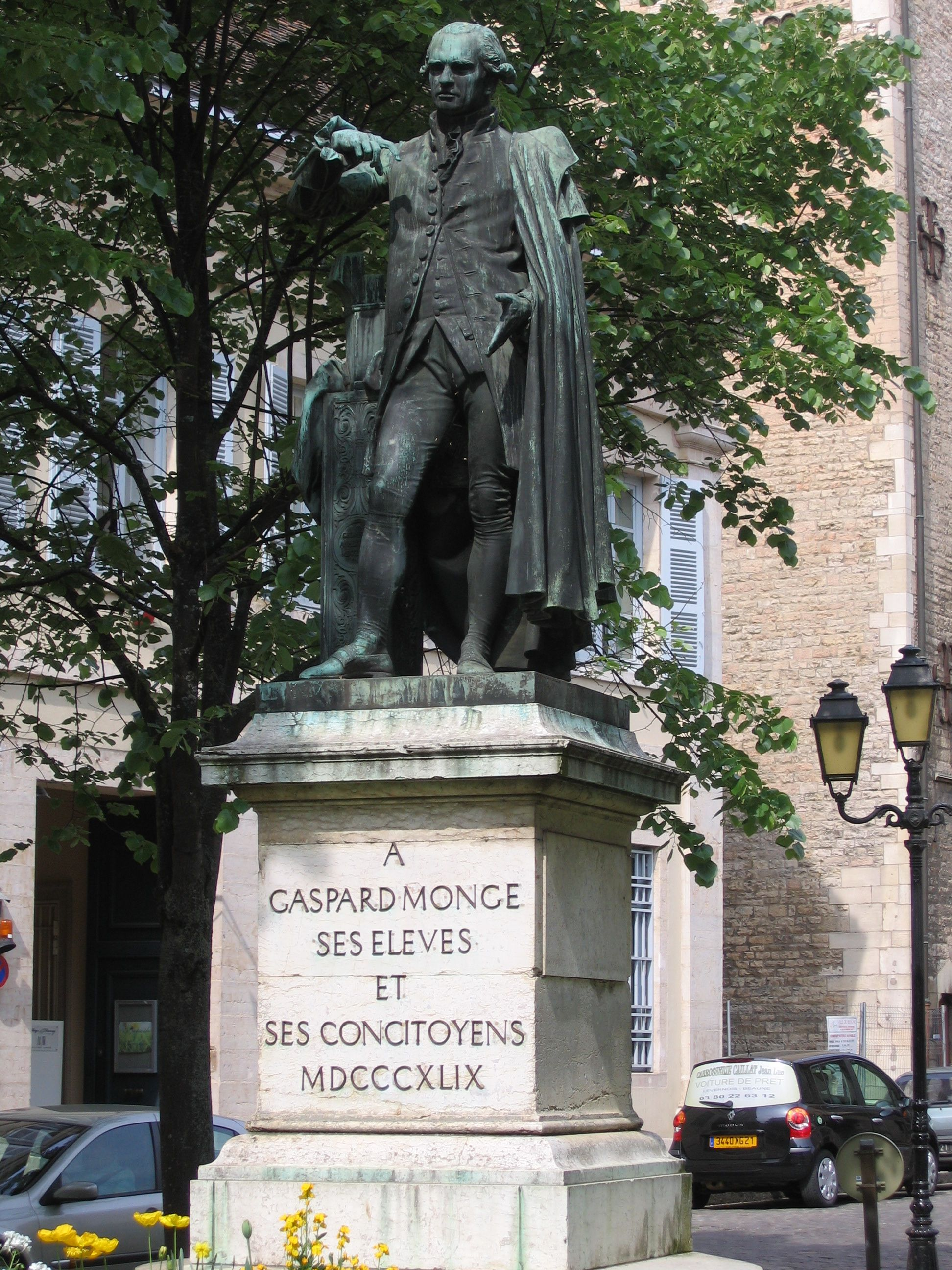 Monument de Gaspard Monge, Beaune, France